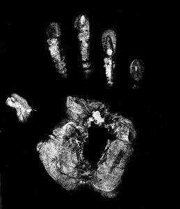 Fotobatik: Handabdruck mit Hautcreme